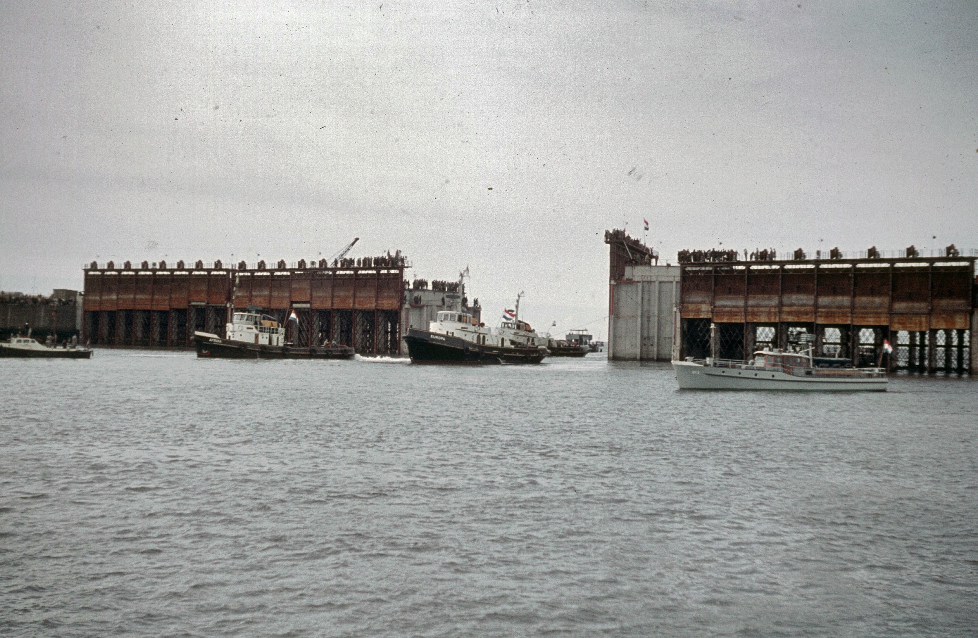 Veerse Gat: Sluiting Dam in Veerse gat noordzijde, laatste caisson verder naar binnen